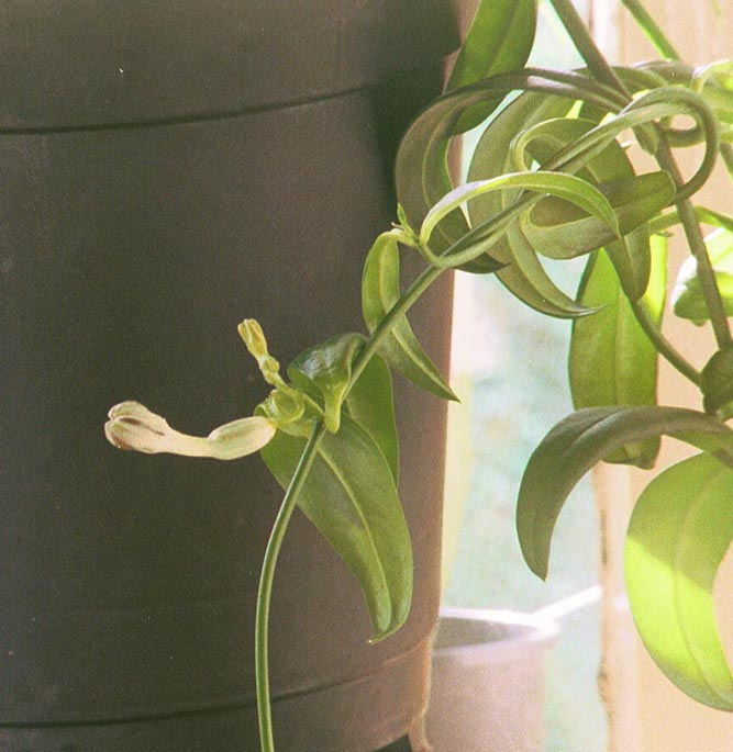 Auteur Maarten van Thiel, Zuidhorn, Nederland, 2004. Public domain.